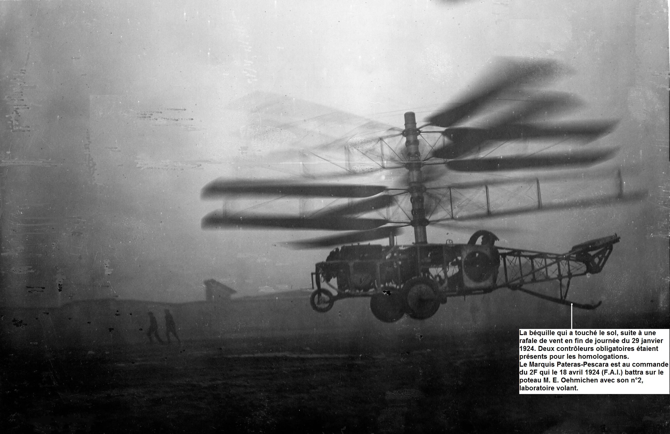 L'hélicoptère Pescara 2F photographié le 29 janvier 1924 pendant sa tentative du km en circuit fermé pour répondre au concours lancé en mars 1923 par l'Aéro-Club de France (un prix de 10.000 fr récompensera celui qui le réalisera en premier). La béquille toucha le sol avant l'accomplissement du km, causant l'échec de la tentative.